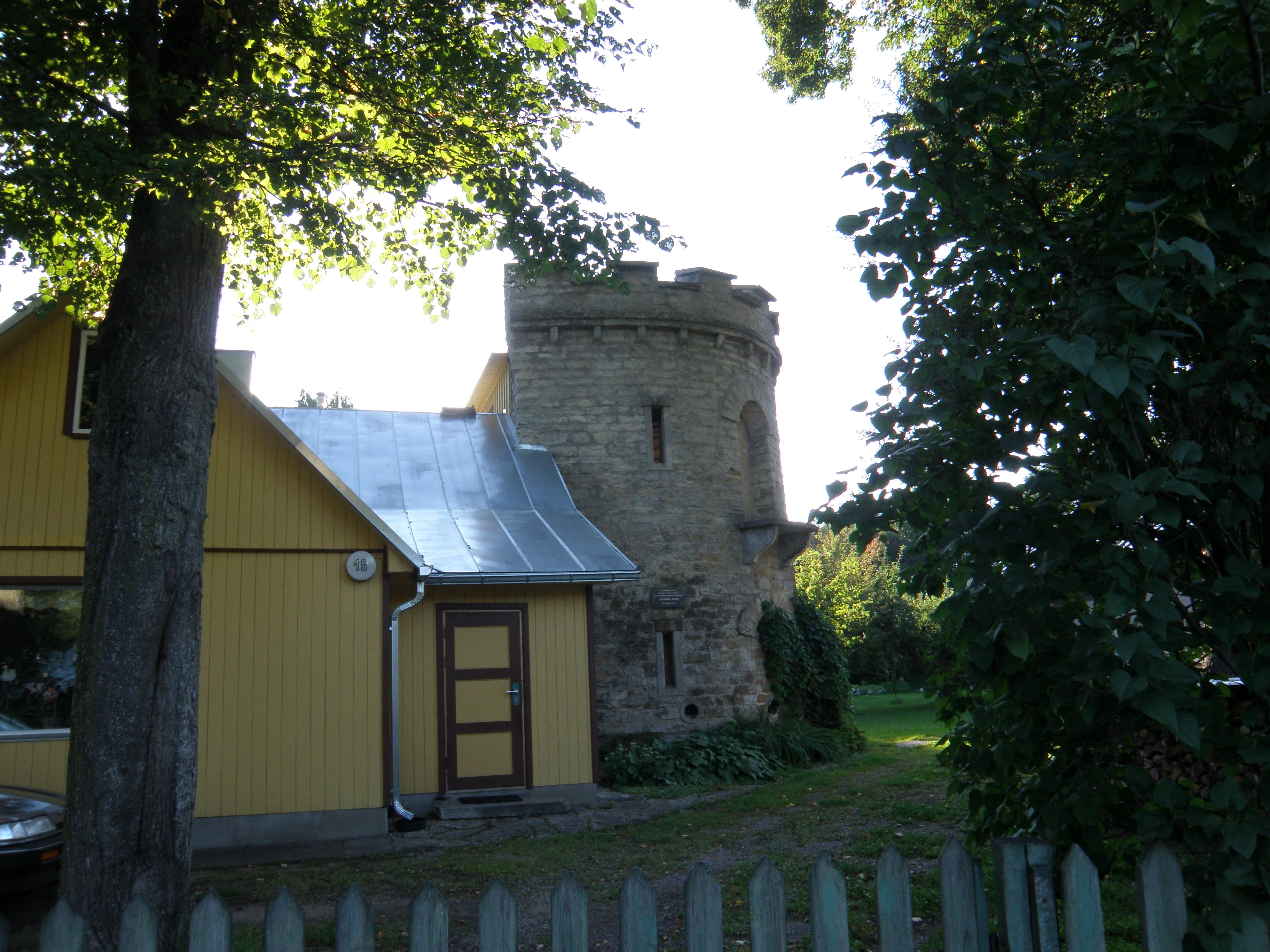 Torn Lossi 15